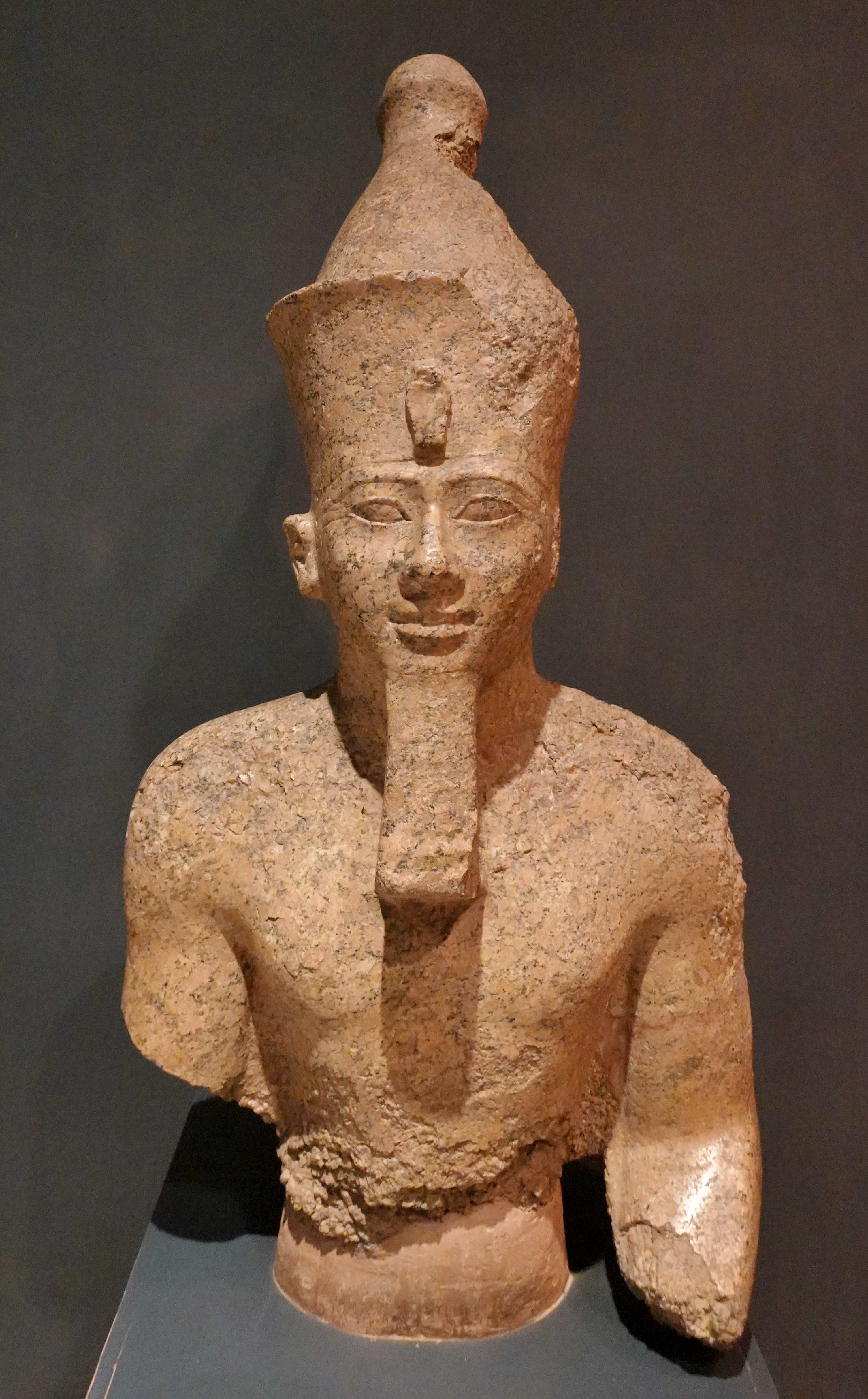 Oberer Teil einer Statue (wahrscheinlich Sitzstatue) des Königs Amenophis II. (Rosengranit, 18. Dynastie), gefunden in Karnak, ausgestellt im Luxor-Museum, Ägypten